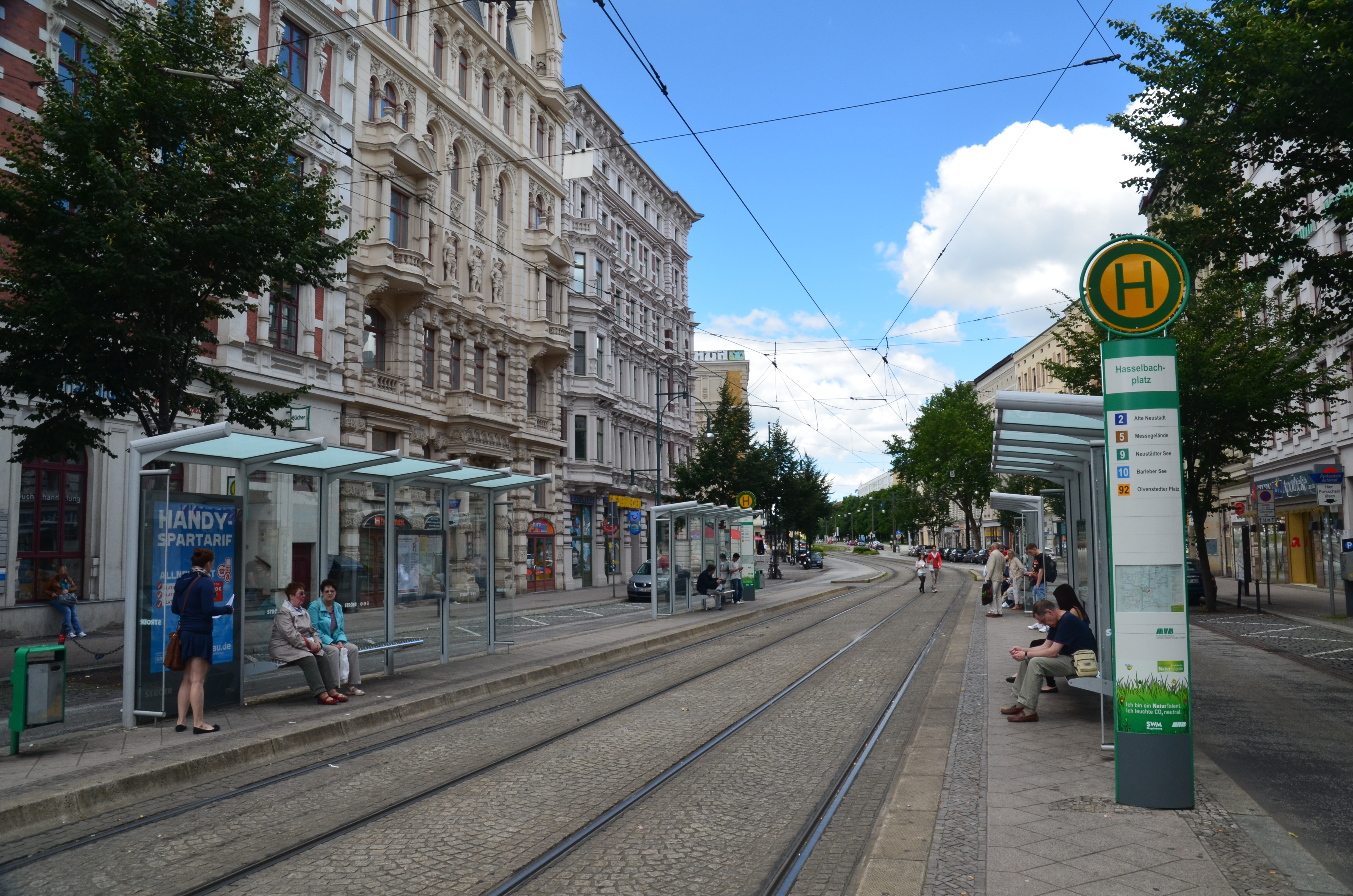 Magdeburg Haltestelle Hasselbachplatz im Breiten Weg